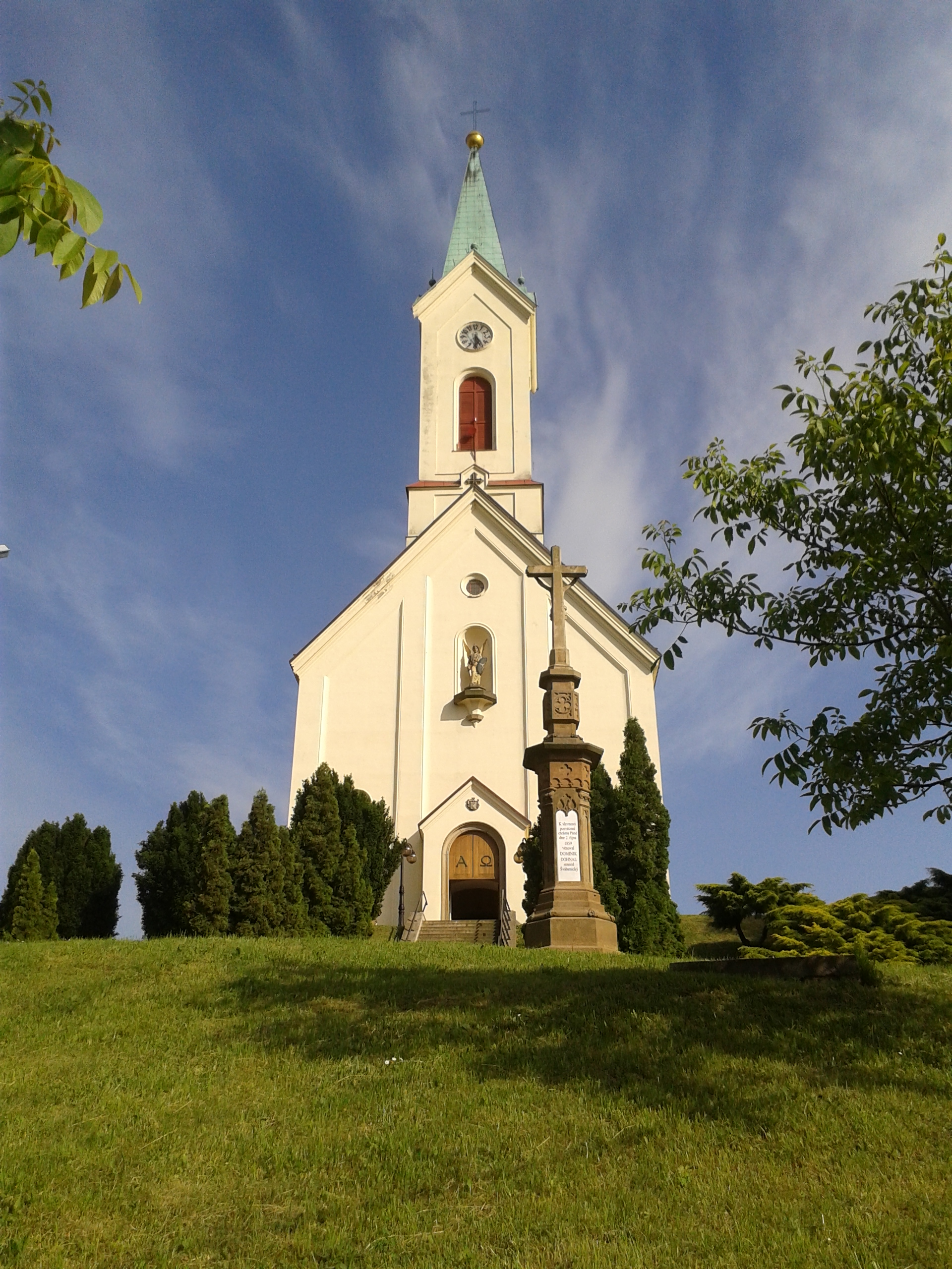 Kostel sv. Michaela Švábenice